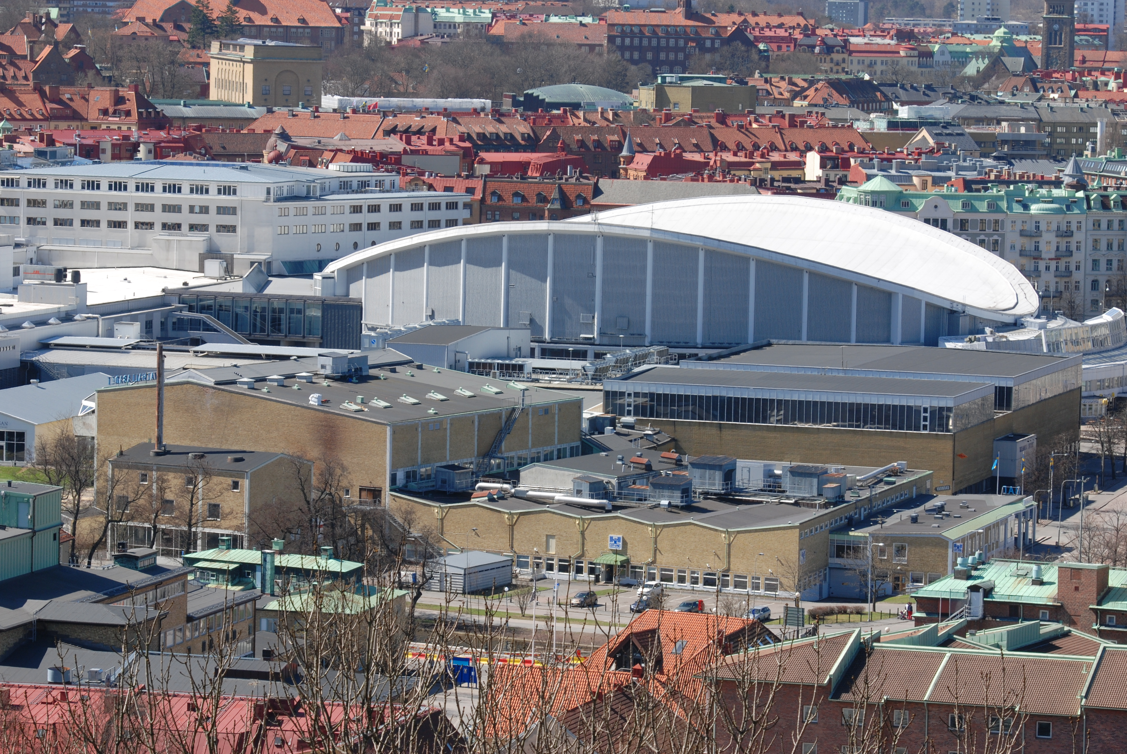 Scandinavium och Valhallabadet.Utsikt från Snikens kulle ovanför Prospect Hillgatan.